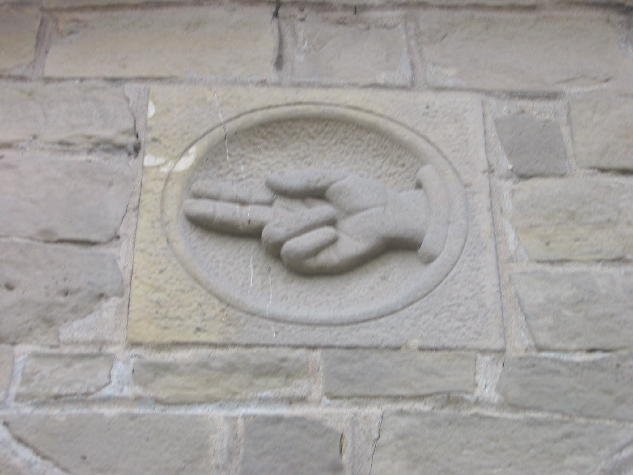 Iglesia de Nuestra Señora del Coll (Barcelona)